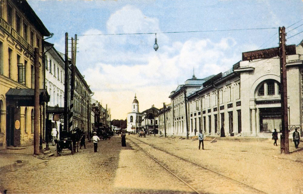 Старый Ярославль. Большая линия (улица Комсомольская) и гостиный двор